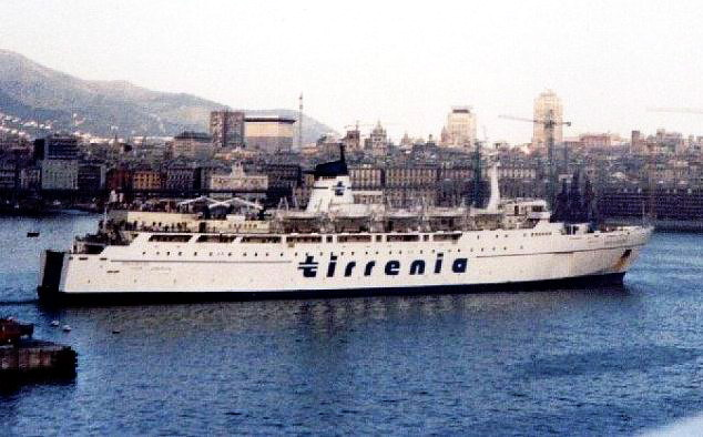 La Nave traghetto Boccaccio ai tempi del servizio con la Tirrenia